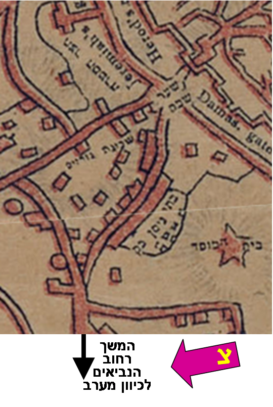 קטע מתוך מפת ירושלים "מפת עה"ק ירושלים וחצרותי' סביב"